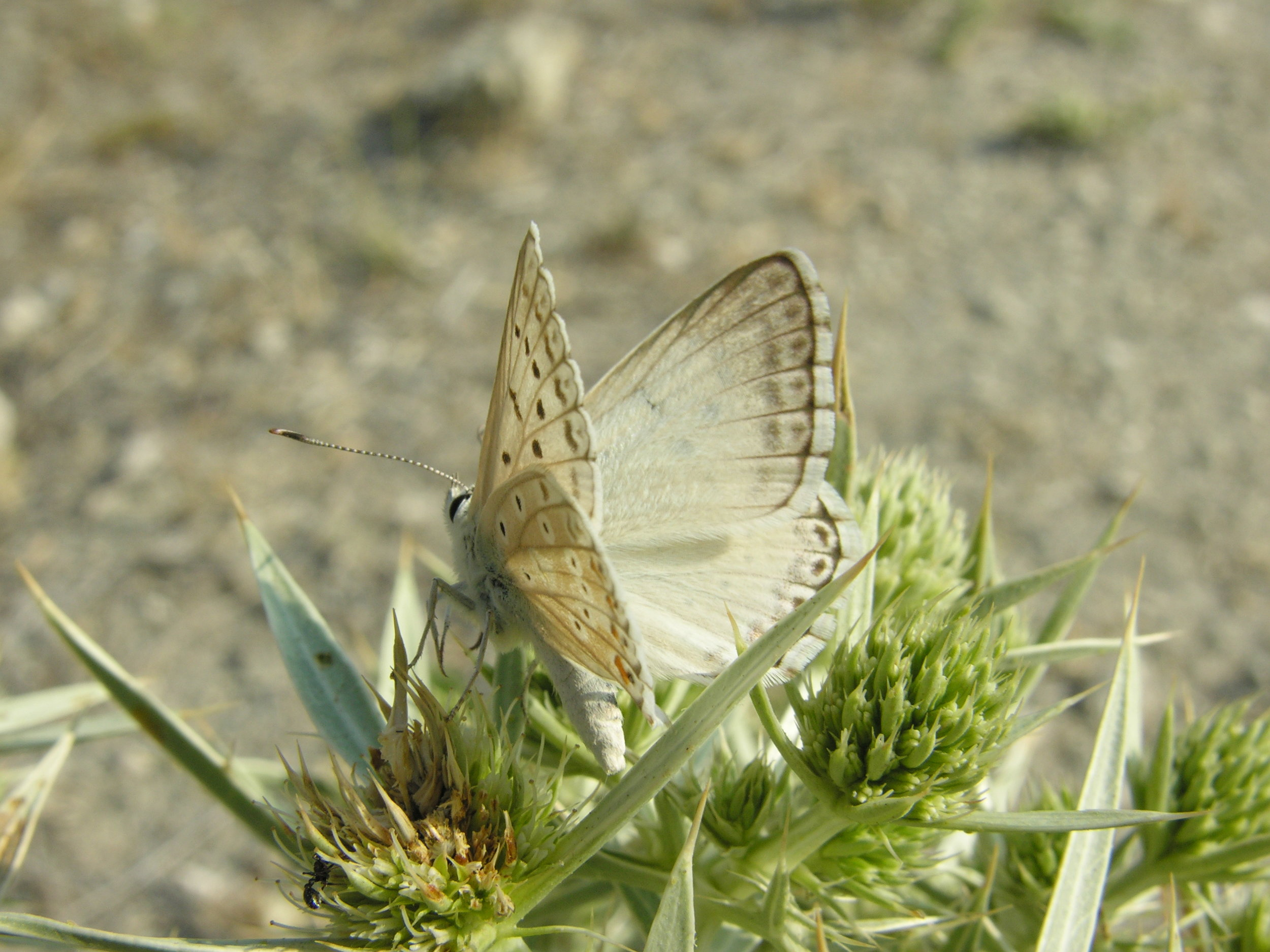 Lysandra albicans (Lycaenidae). Rivas Vaciamadrid, Madrid, España.